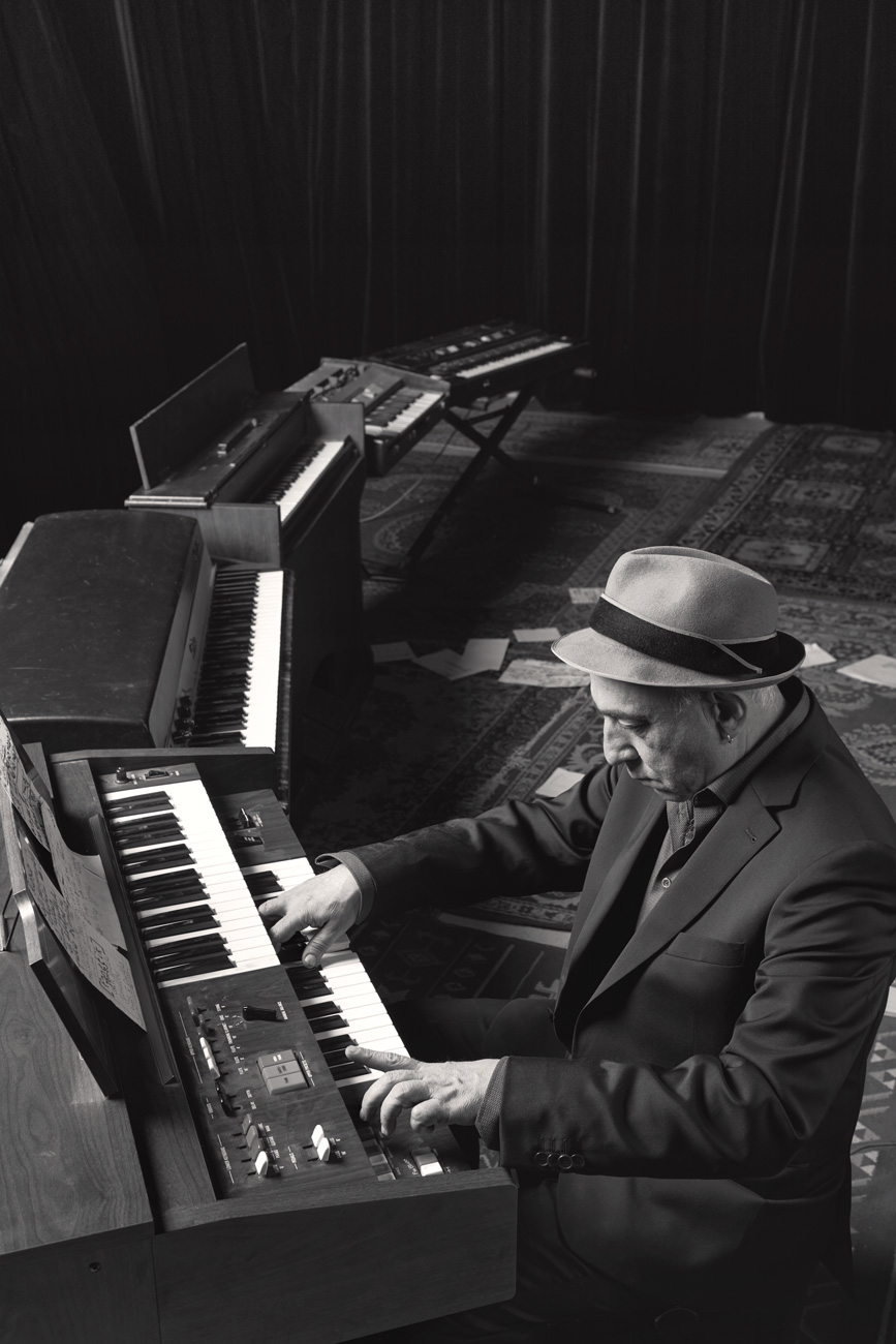 Denis Péan